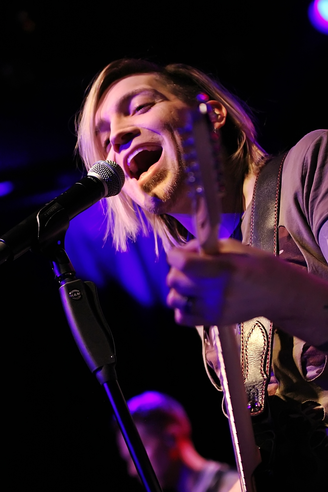 ALEX BAND mit THE CALLING - Nürnberg 2020